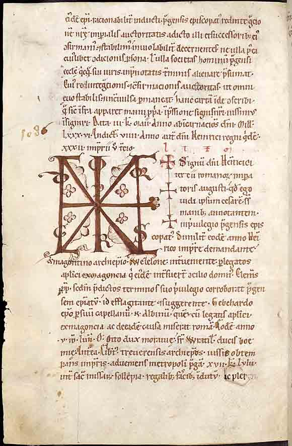 102 лист Будишинского списка